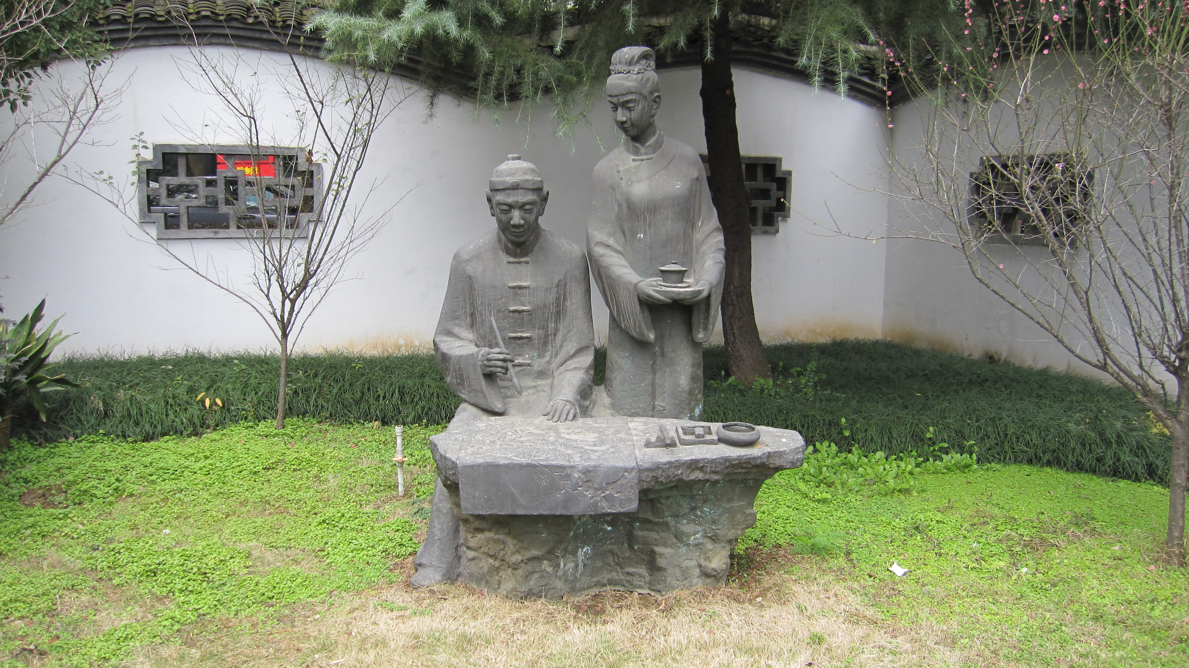 中文（中国大陆）: 彭玉麟故居的彭玉麟和梅姑塑像